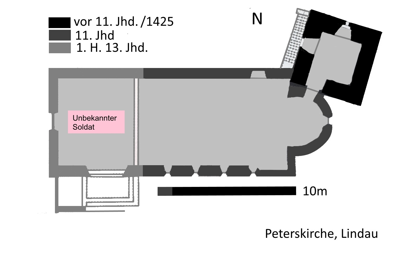 nach: Adam Horn, Werner Meyer et al.: Die Kunstdenkmäler von Lindau (Bodensee). Lindau 1955, S. 61 (Sonderdruck aus: Horn, Meyer: Stadt und Landkreis Lindau. In: Die Kunstdenkmäler von Bayern. Oldenbourg, München 1954)